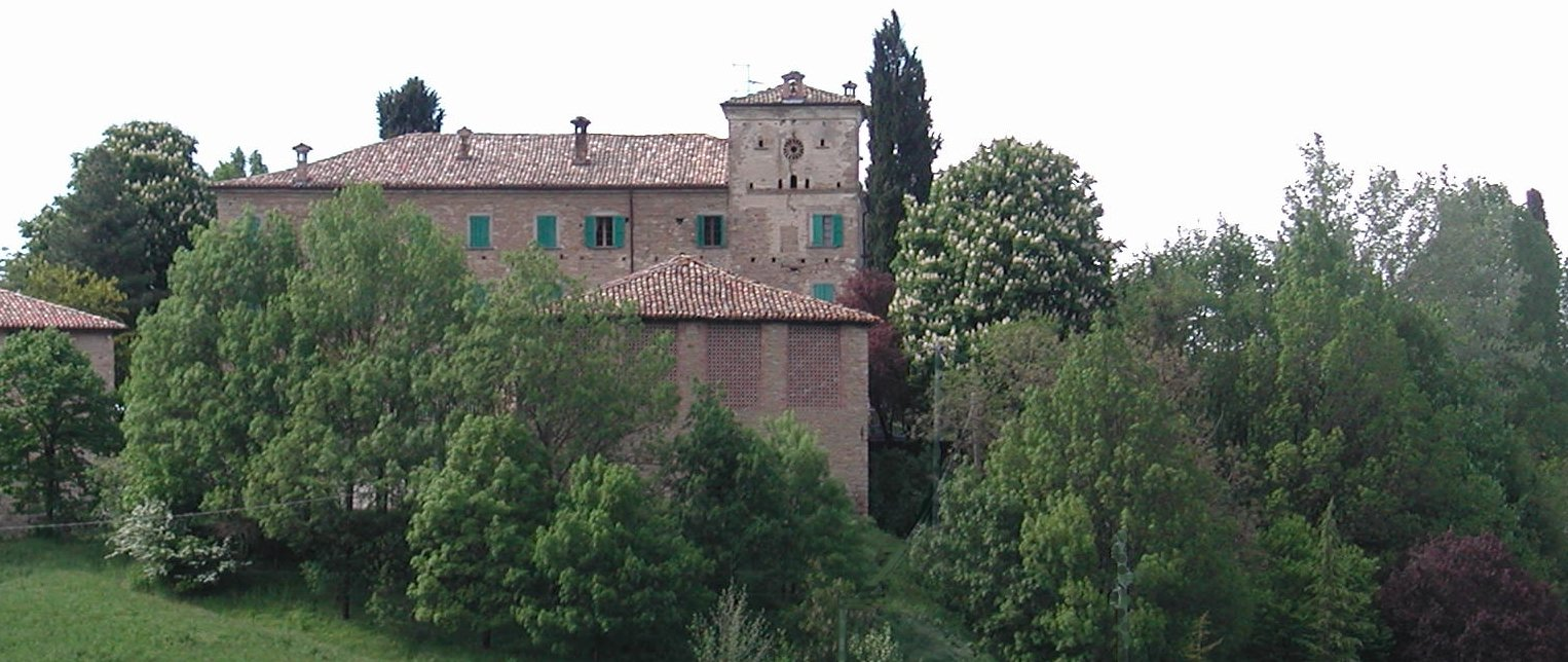 Carpineti. comune della provincia di Reggio Emilia, Italia immagine di una casa a torre